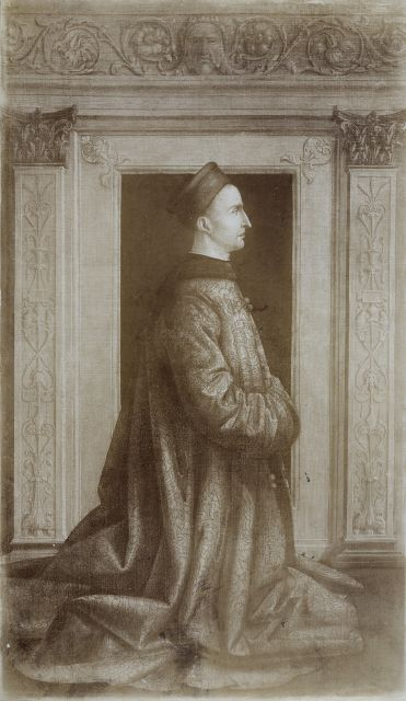 Anonimo — Vicino da Ferrara - sec. XV - Ritratto di Galeotto I Pico della Mirandola (?)